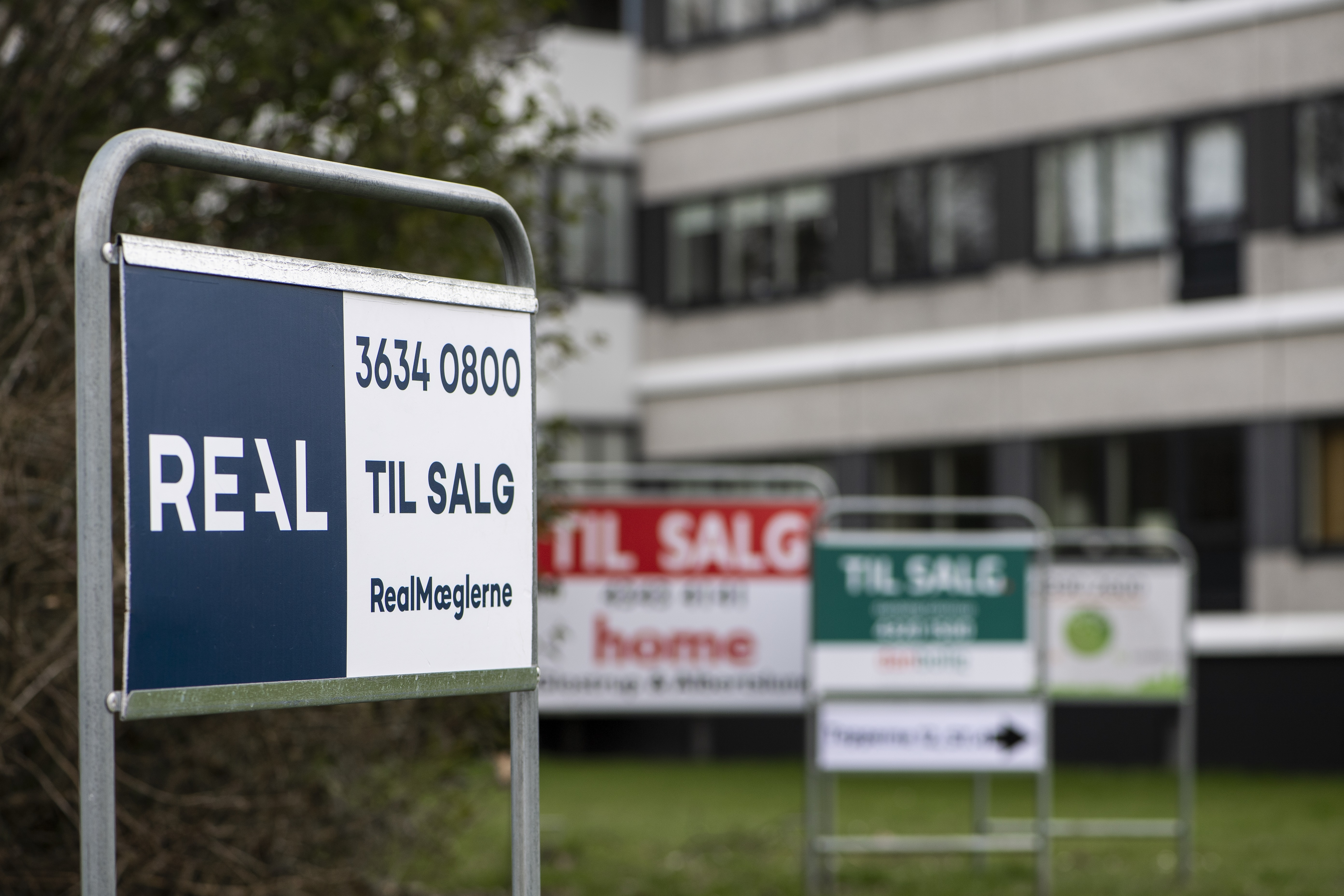 RealMæglerne er blandt Danmarks største og ældste ejendomsmæglerkæder.